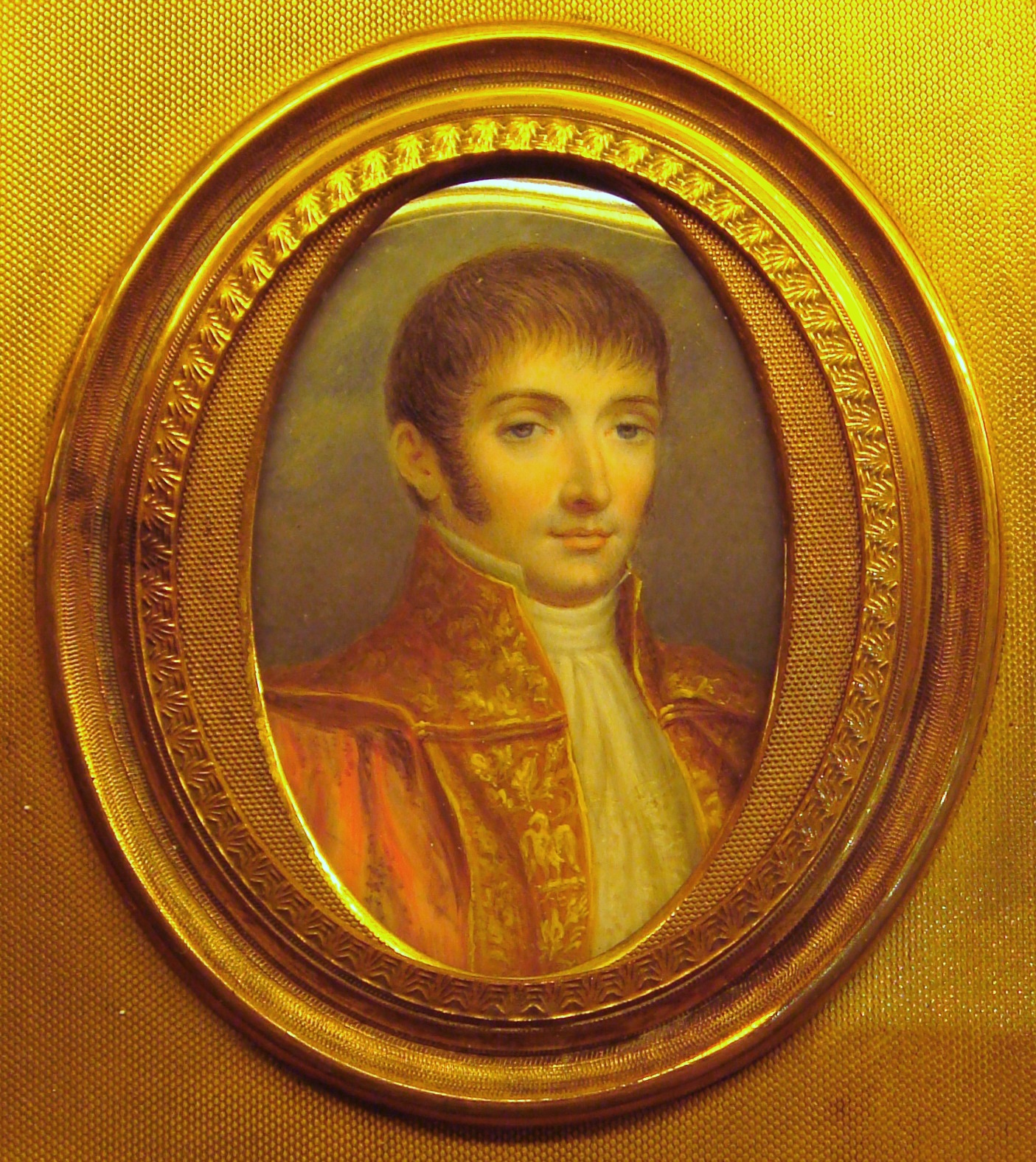 Portrait of Louis Bonaparte (1778-1846)